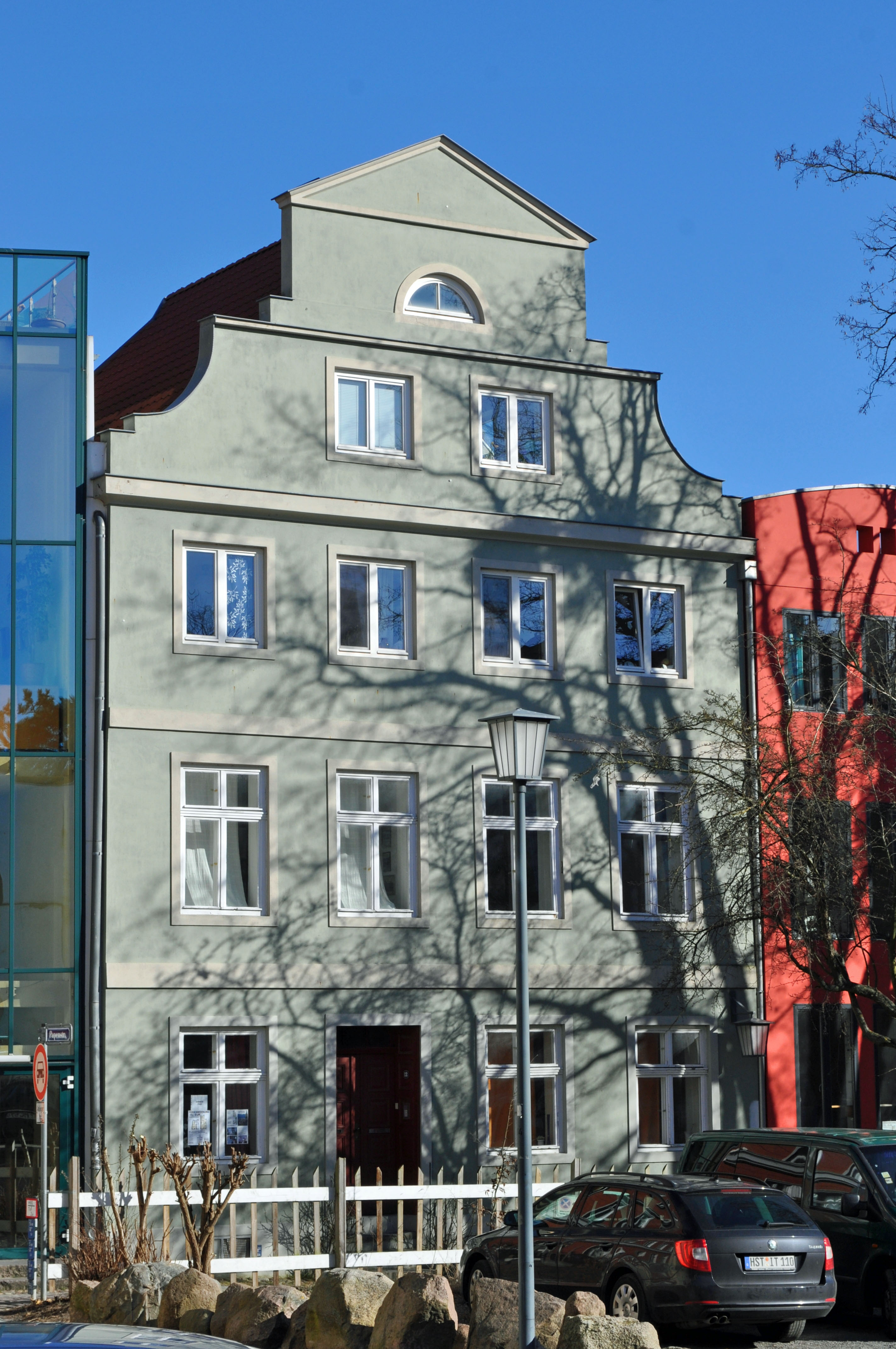 Gebäude bzw. Gebäudedetail in Stralsund. Straße und Hausnummer siehe Dateiname. Das Gebäude ist als Baudenkmal ausgewiesen, siehe dazu die Liste der Baudenkmale in Stralsund.